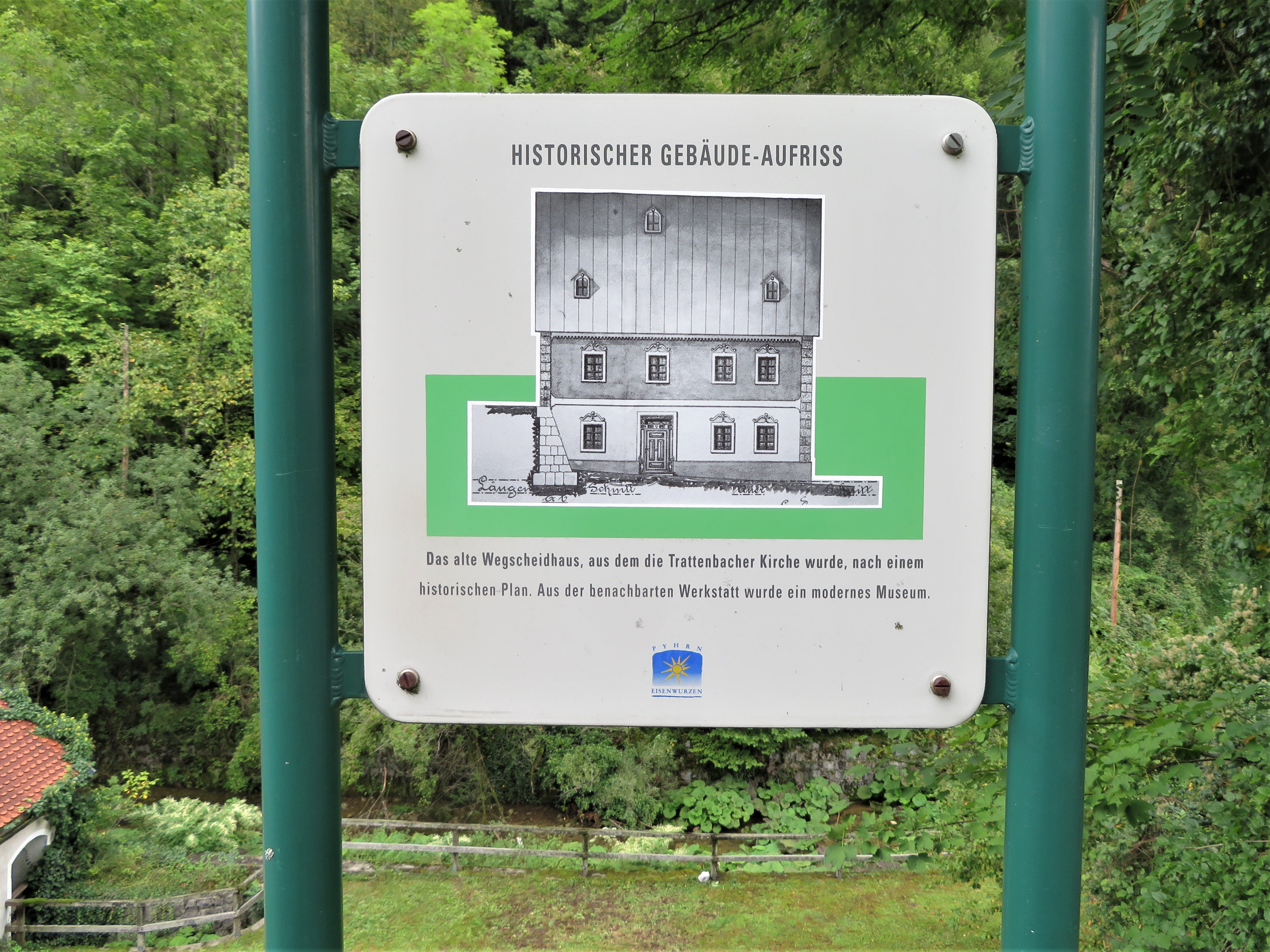 Filialkirche Ternberg-Trattenbach Infotafel